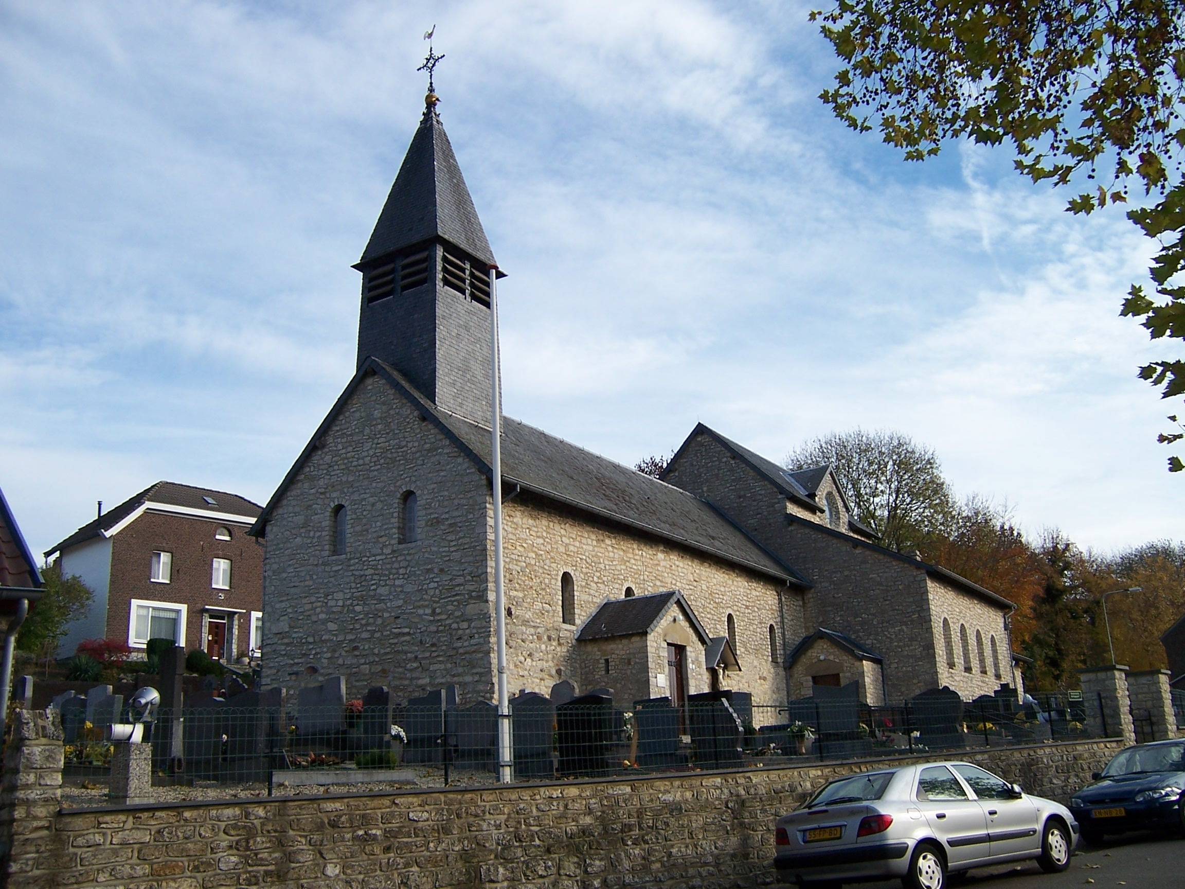 eigen foto kerk van Nijswiller